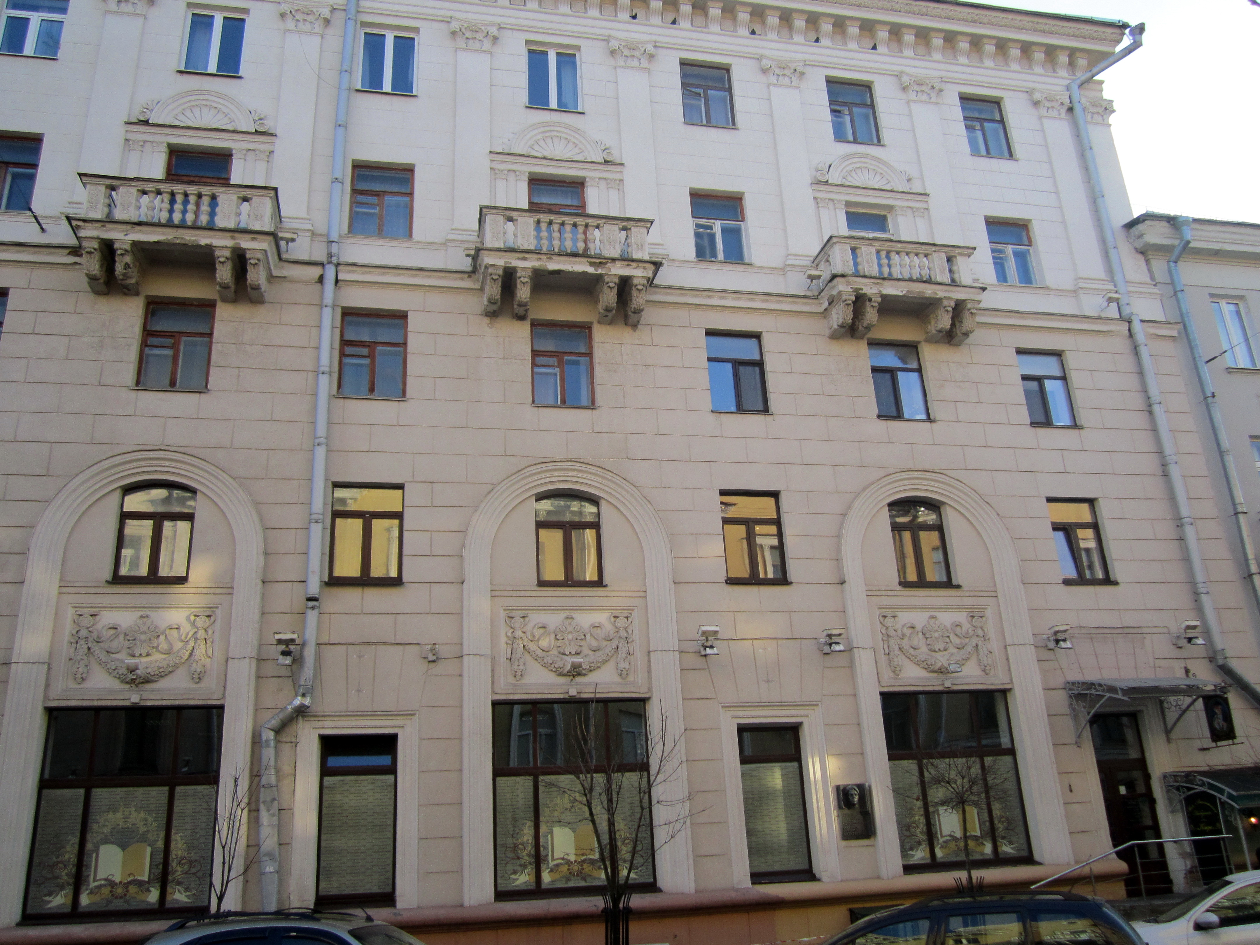 Дом МанаЛІТ, Мінск, вул. К. Маркса, 36. Дом, у якім жылі беларускія пісьменнікі Я. Маўр, Ўл. Караткевіч, і інш.. Выгляд збоку, з памятнай шыльдай Караткевічу